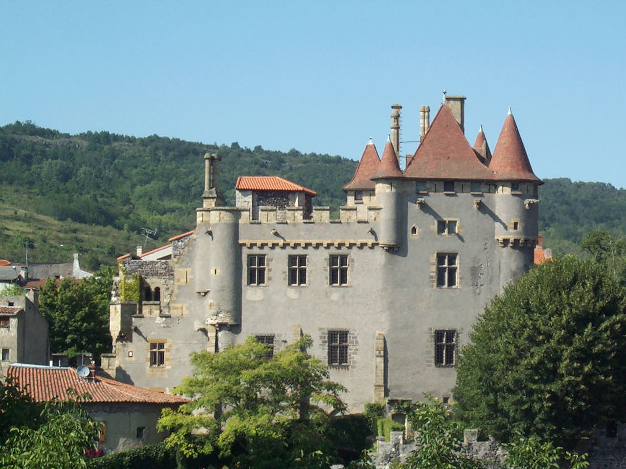 Vue de Murol en Saint Amant facade Sud